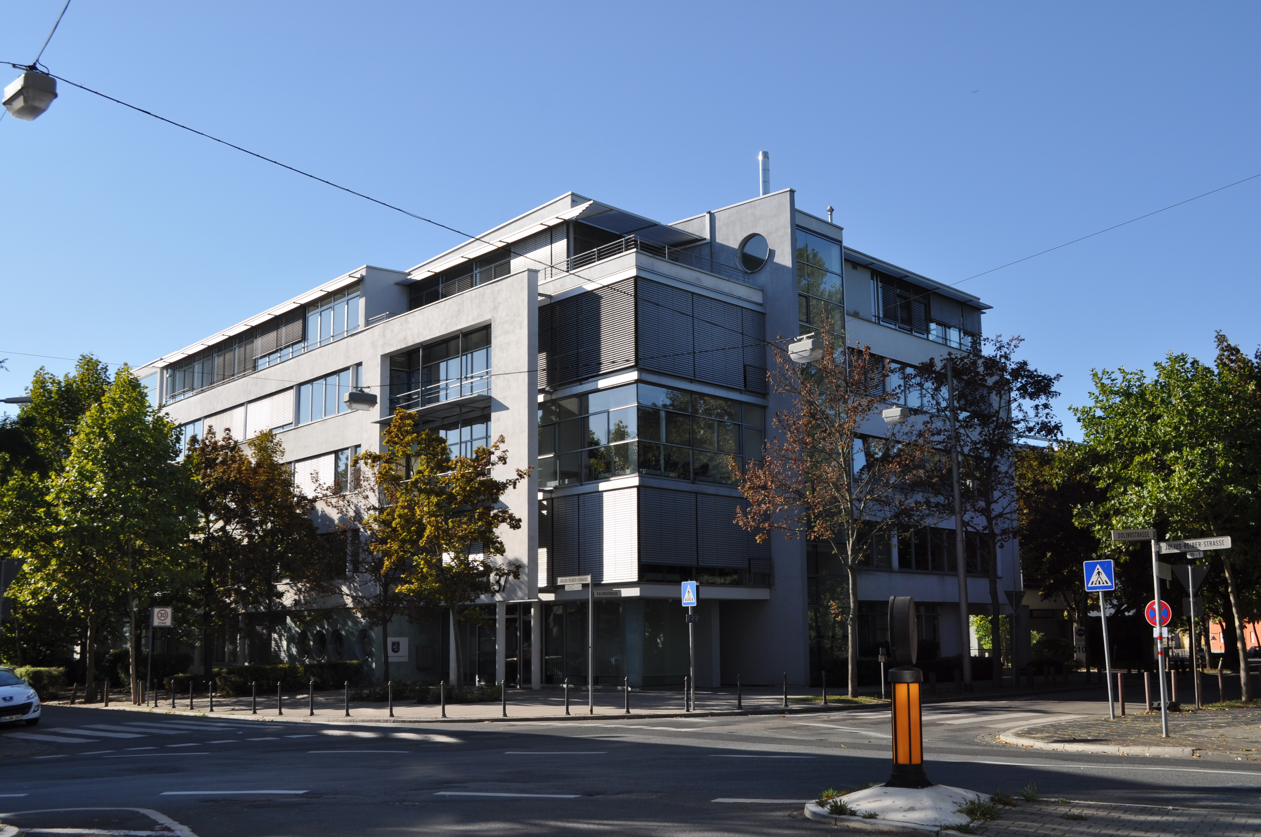 Gebäude des Verwaltungsgerichtes Darmstadt in der Julius-Reiber-Straße